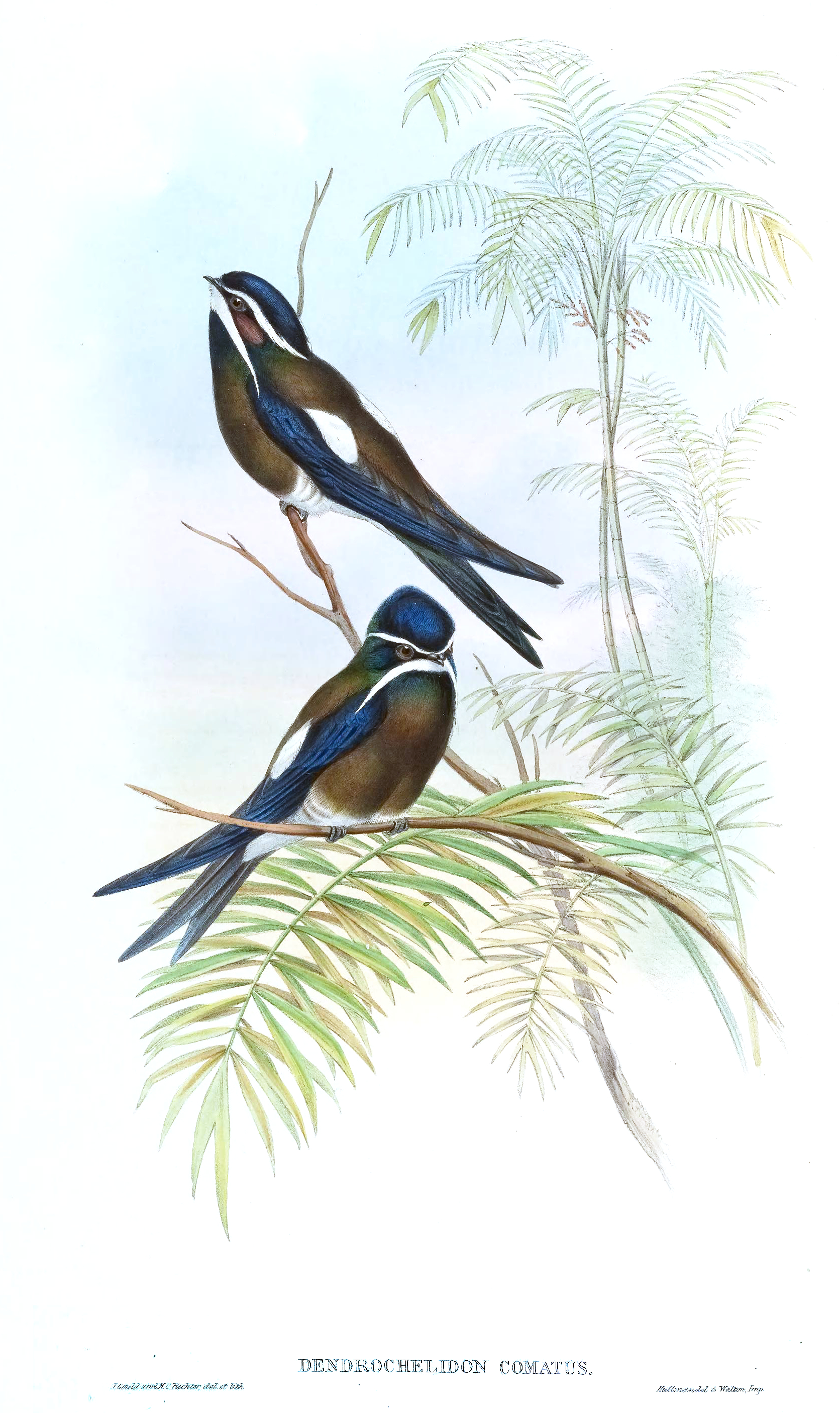 Dendrochelidon comatus = Hemiprocne comata